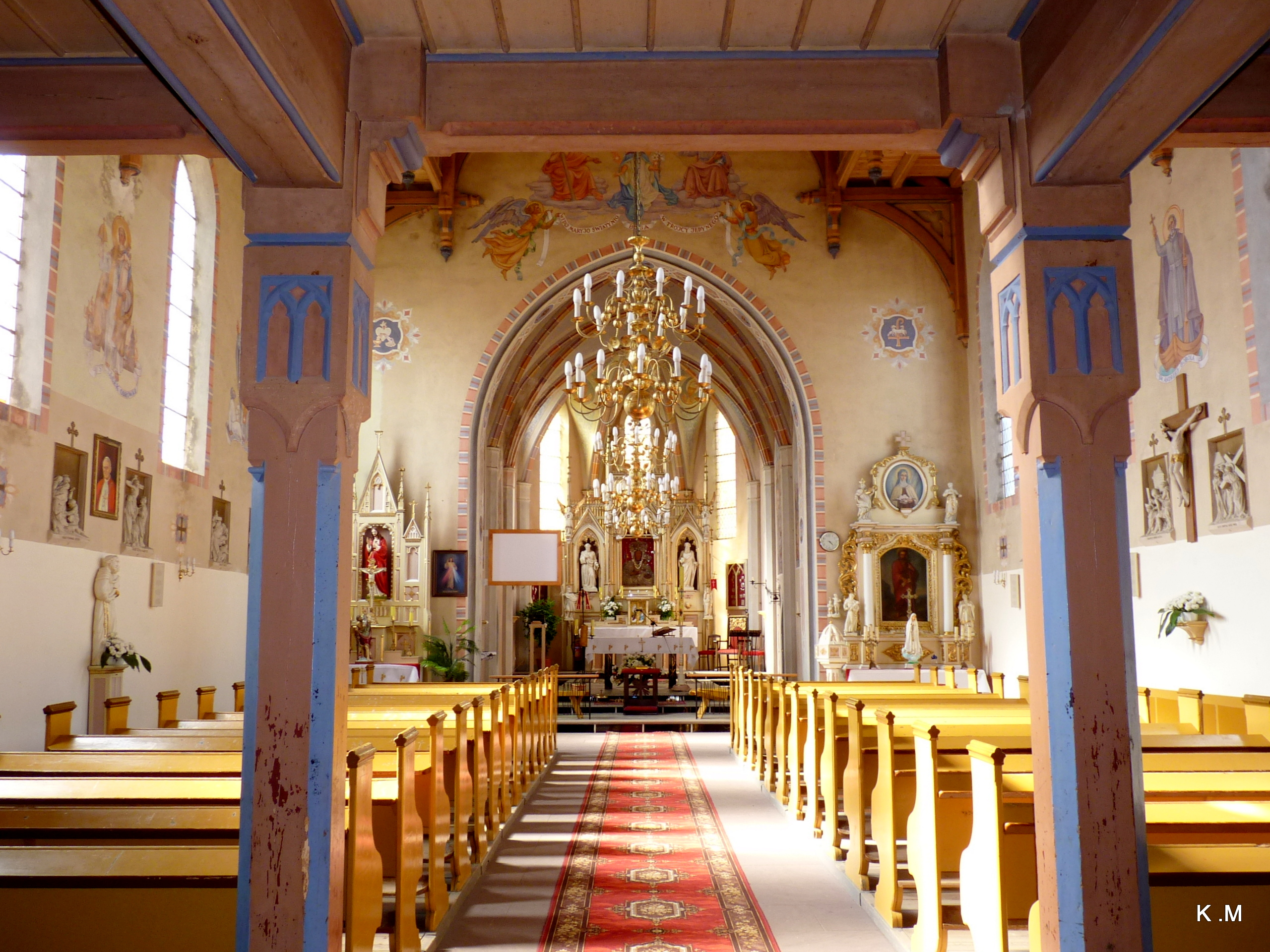 Zabartowo - kościół p.w. św. Jakuba, 1865-1866